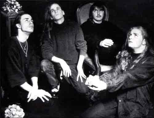 Pyogenesis - Portrait Ignis Creatio, 1991